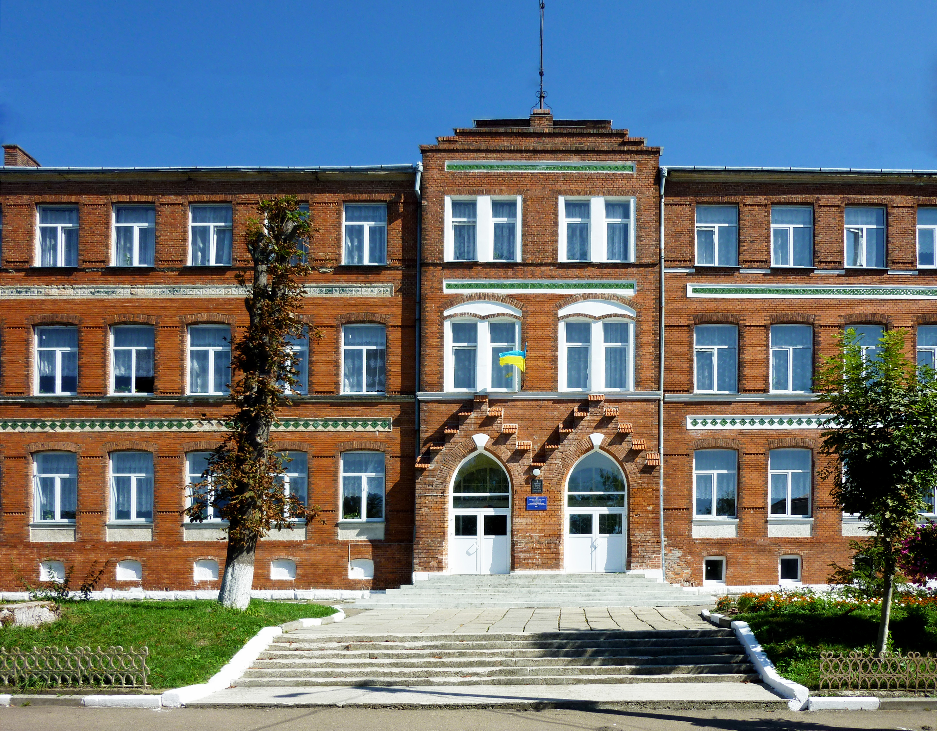 Школа (поч. ХІХ ст.)